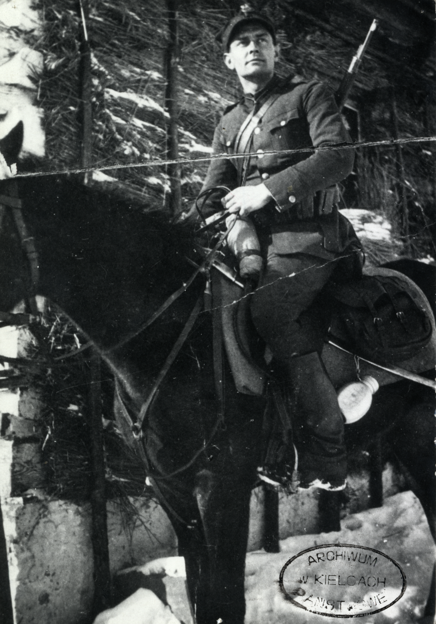 Ze zbiorów AP w Kielcach